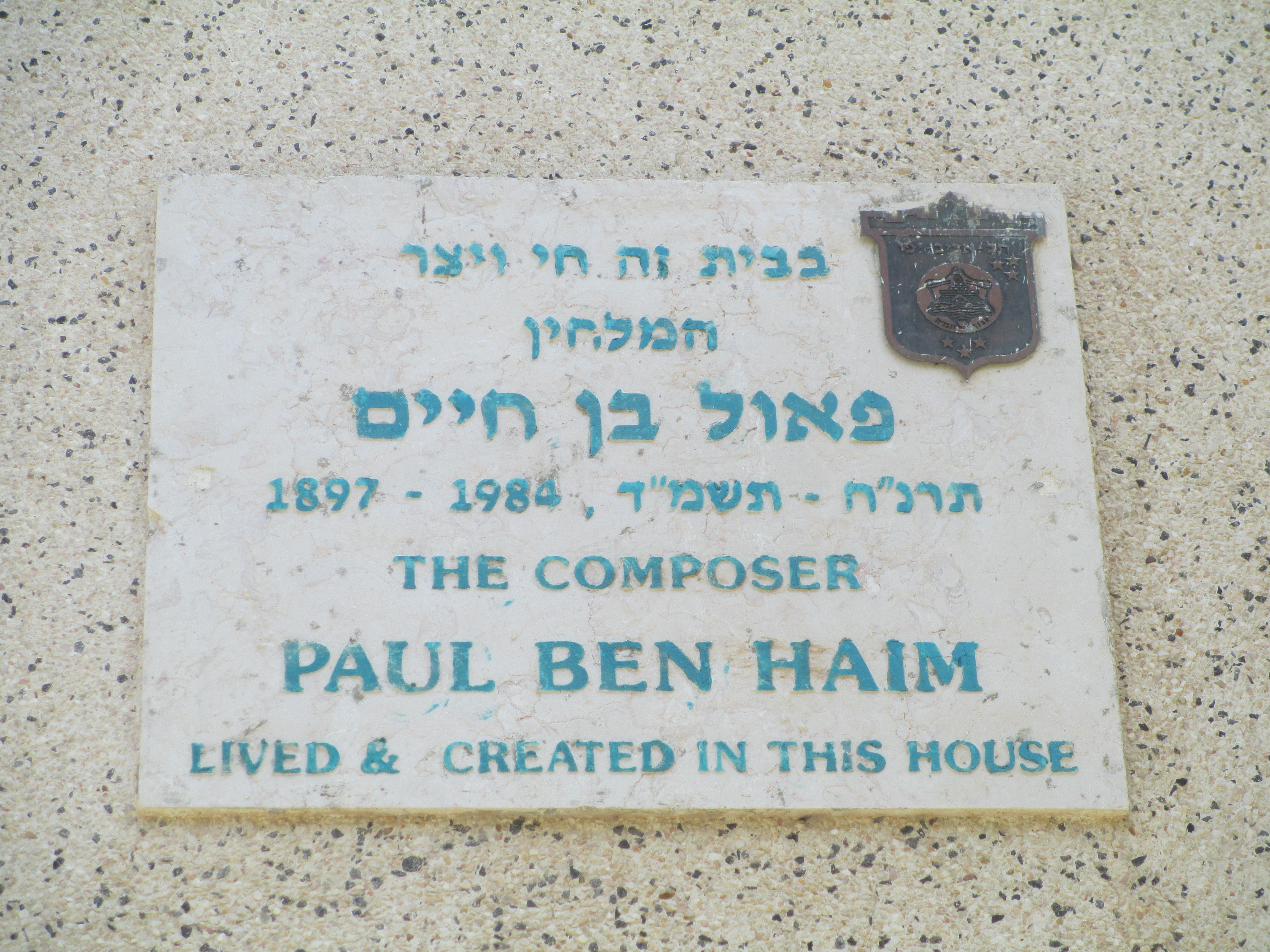 לוחית זיכרון למלחין פאול בן חיים ברח' אהרונוביץ 11 בתל אביב